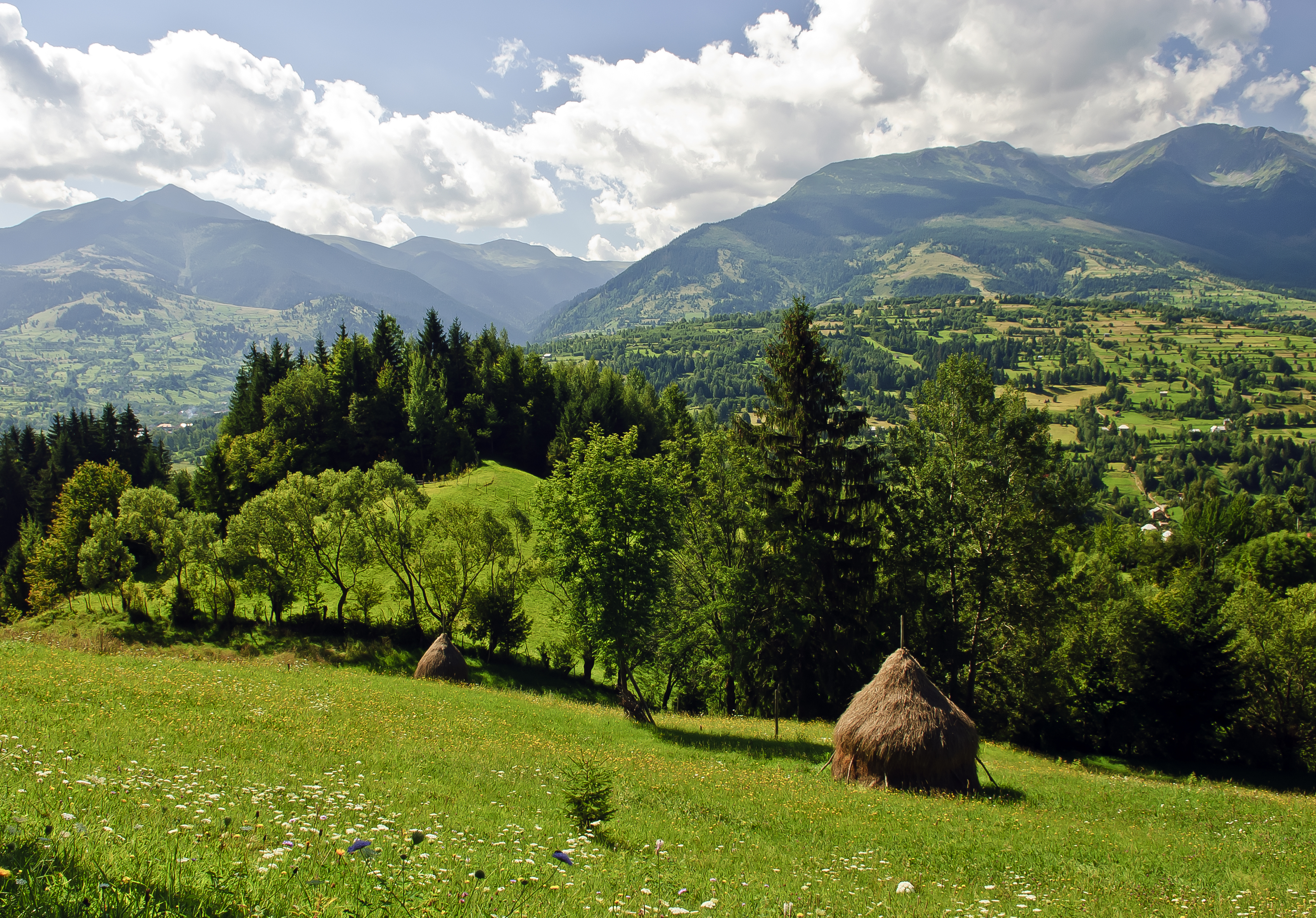 Peisaj montan Pietrosu Mare